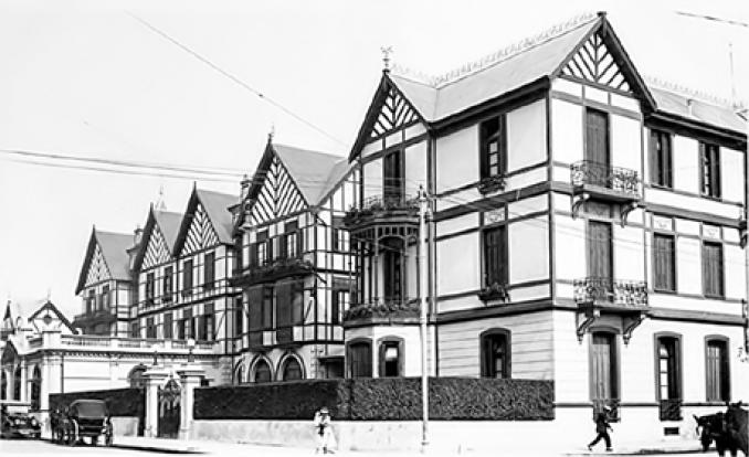 Hotel Bristol, en la ciudad de Mar del Plata (Argentina) hacia la década de 1930. Hacia el lado izquierdo de la imagen, el edificio original del hotel (inaugurado en 1888) y hacia el extremo derecho se ve parte de un anexo con más habitaciones agregado años más tarde.